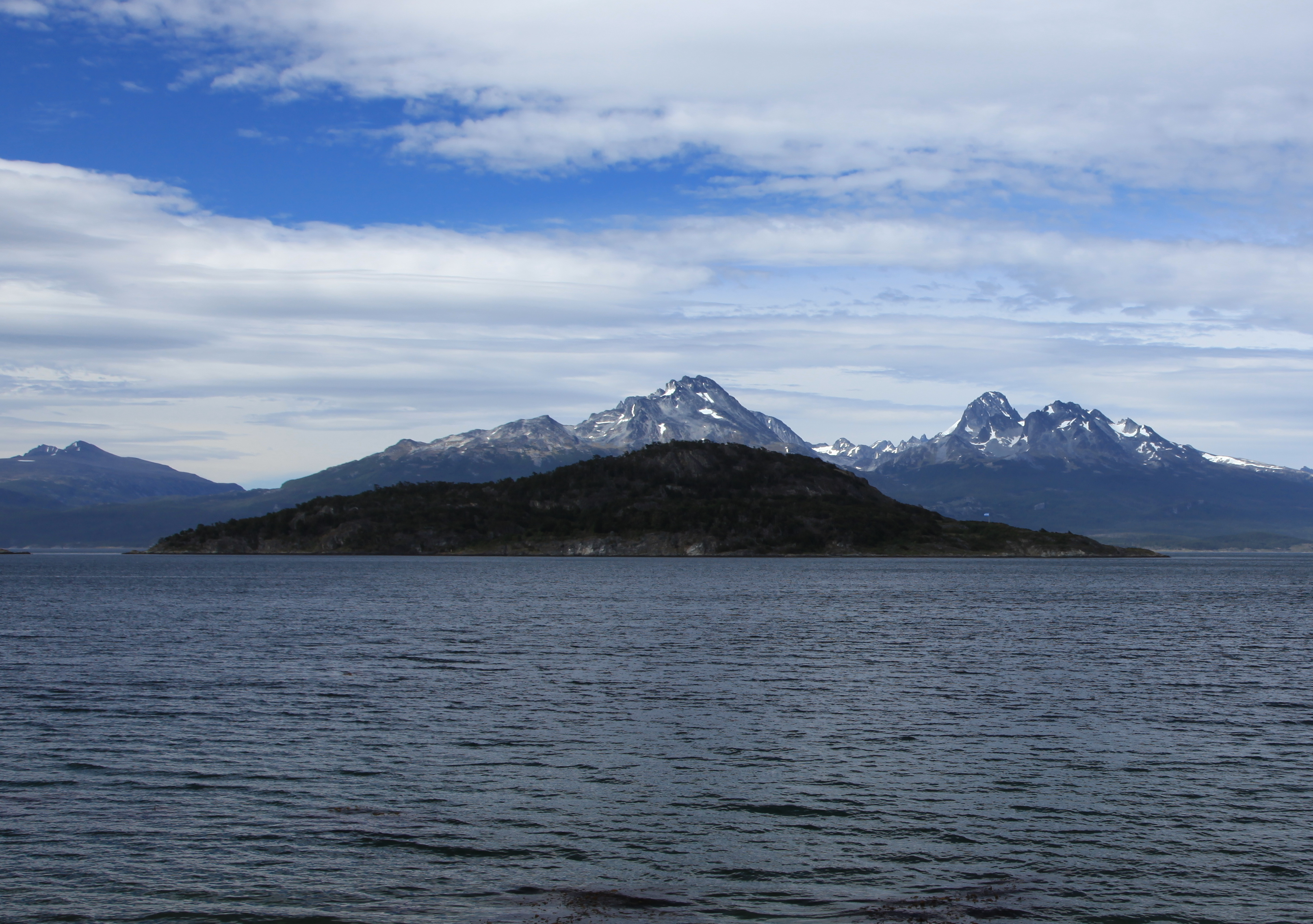 In Tierra del Fuego National Park, Argentina.